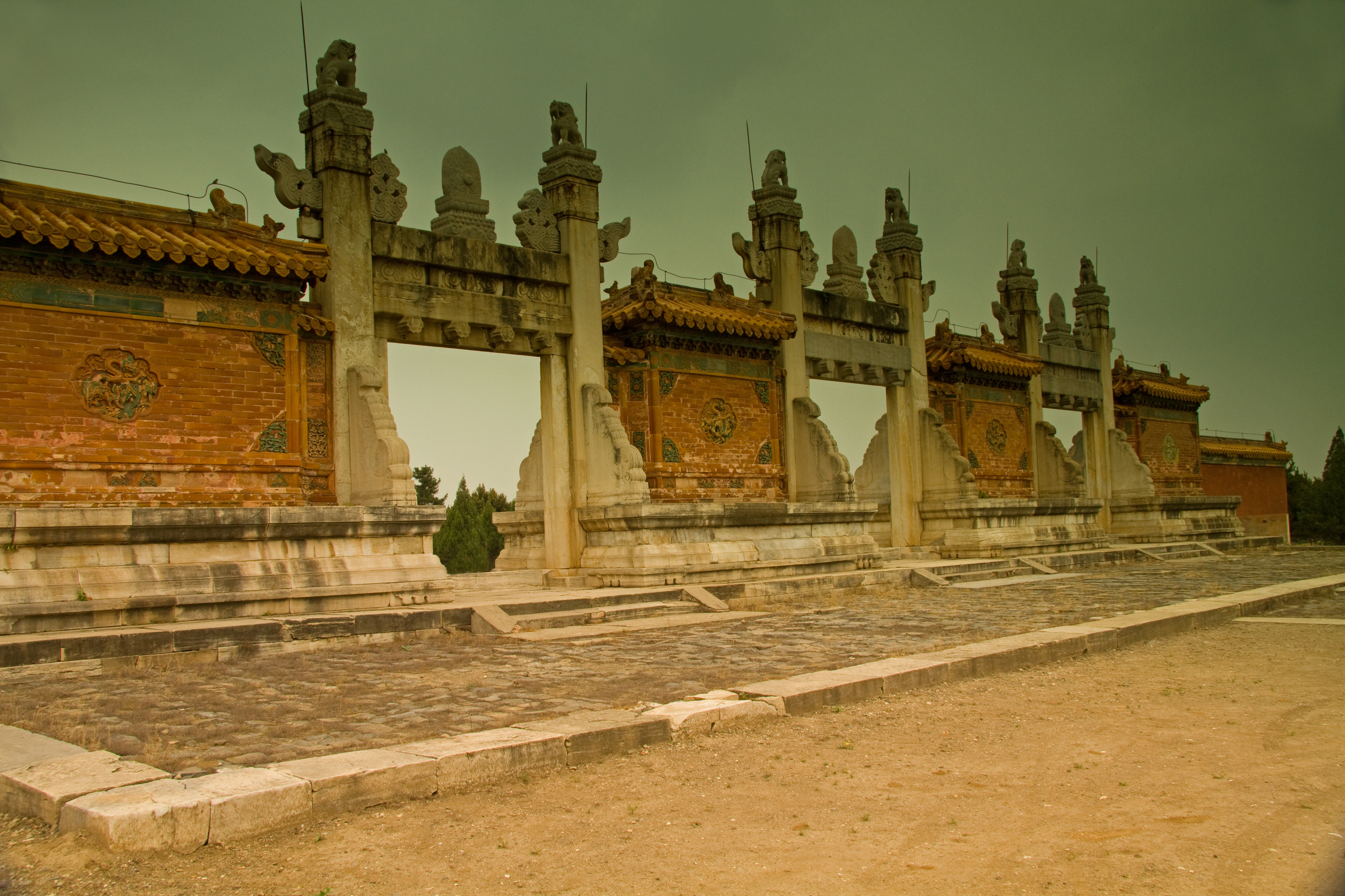 Qing Tombs 39